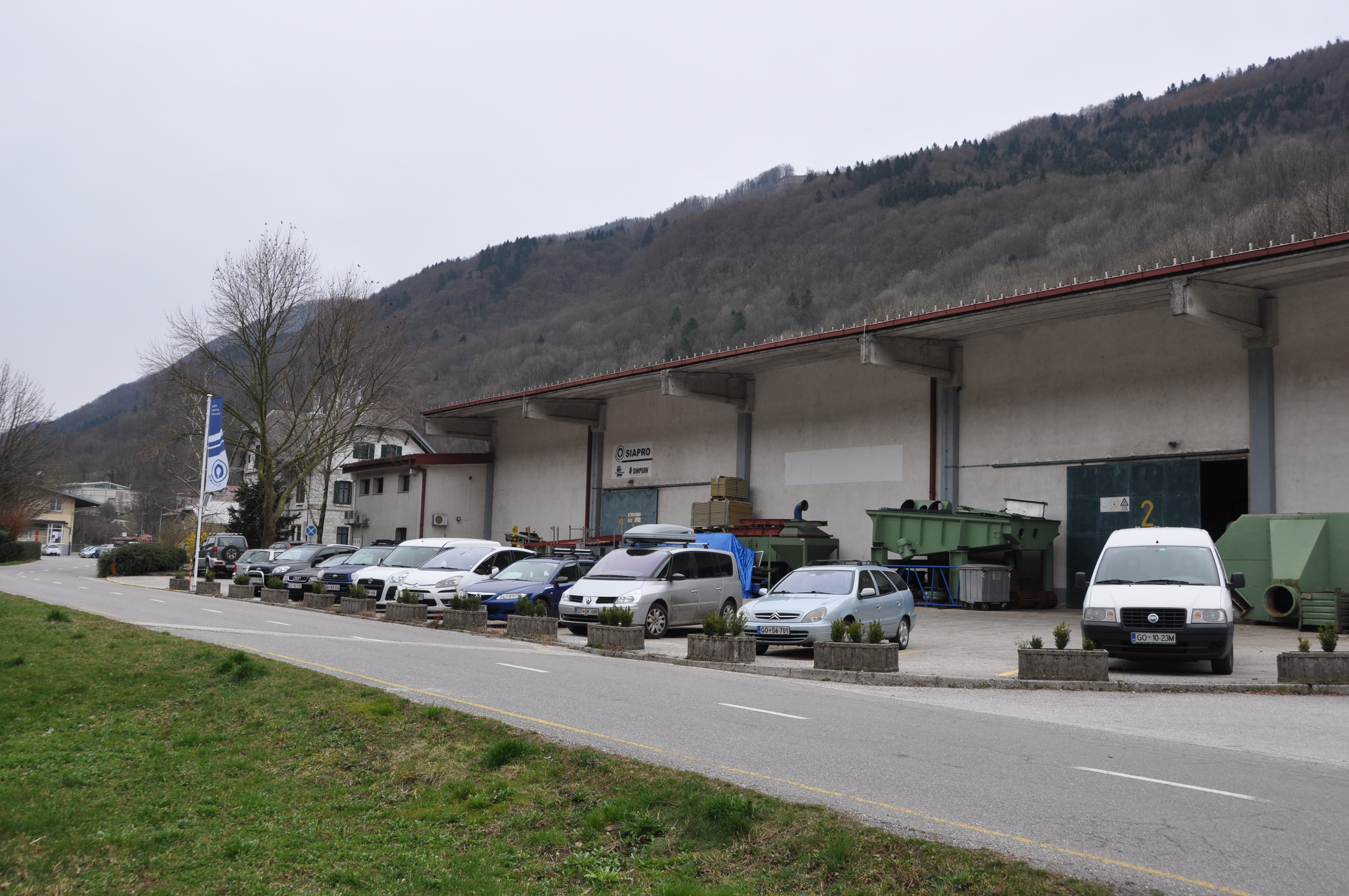 Siapro d.o.o., Postaja 9, 5216 Mosta na Soči, sedež podjetja